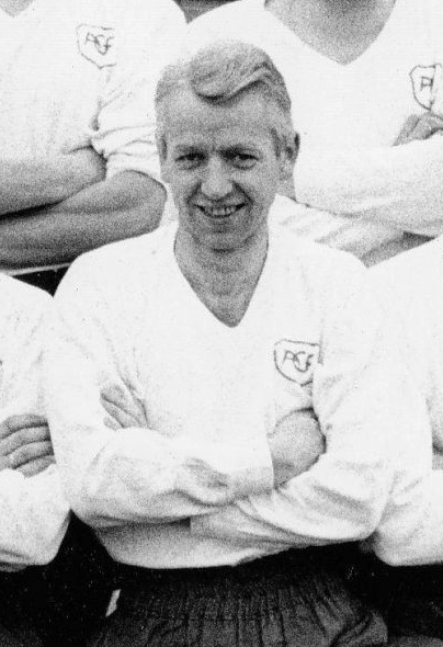 Jørgen Olesen